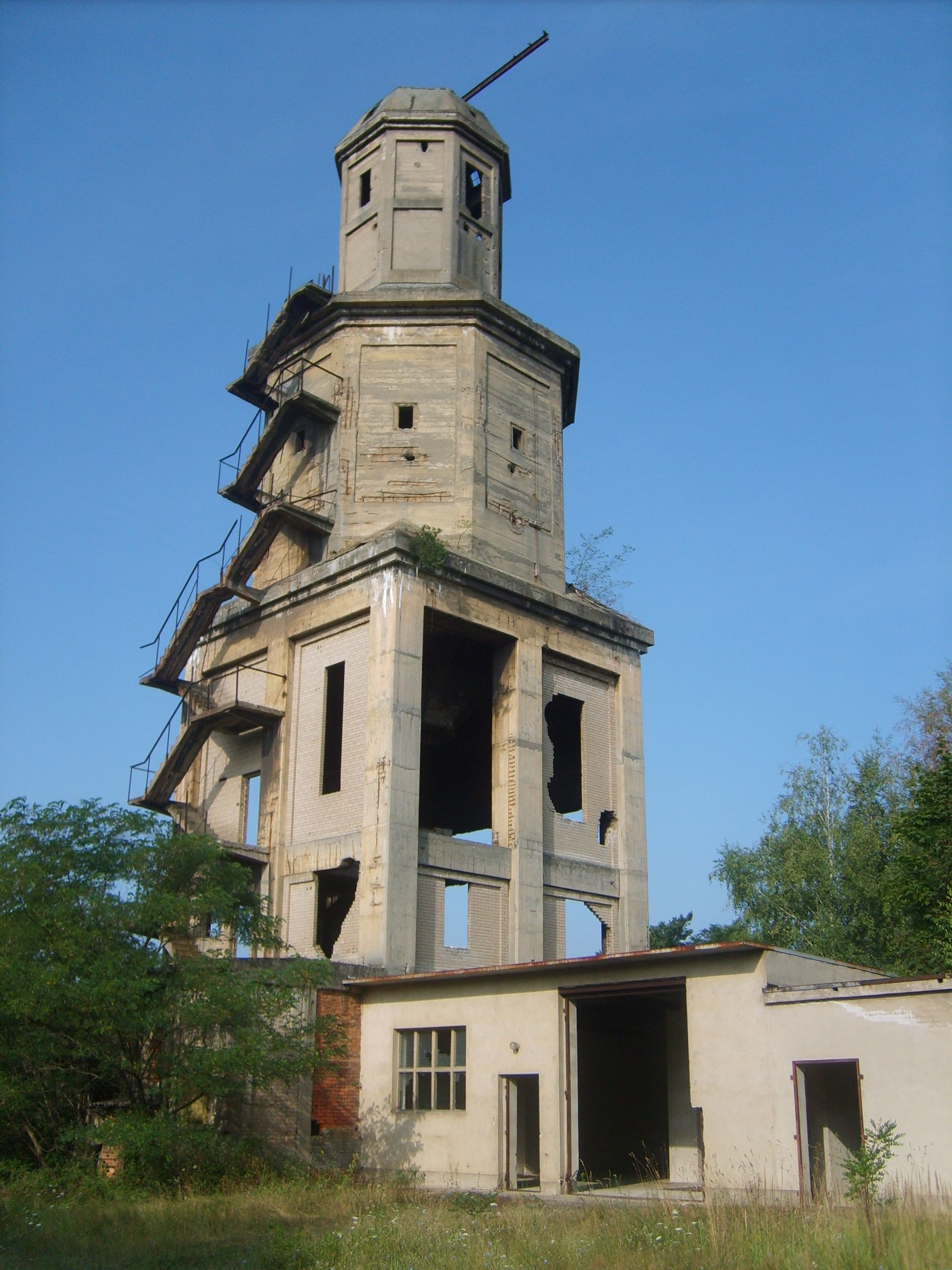 Berzitturm Kahla.